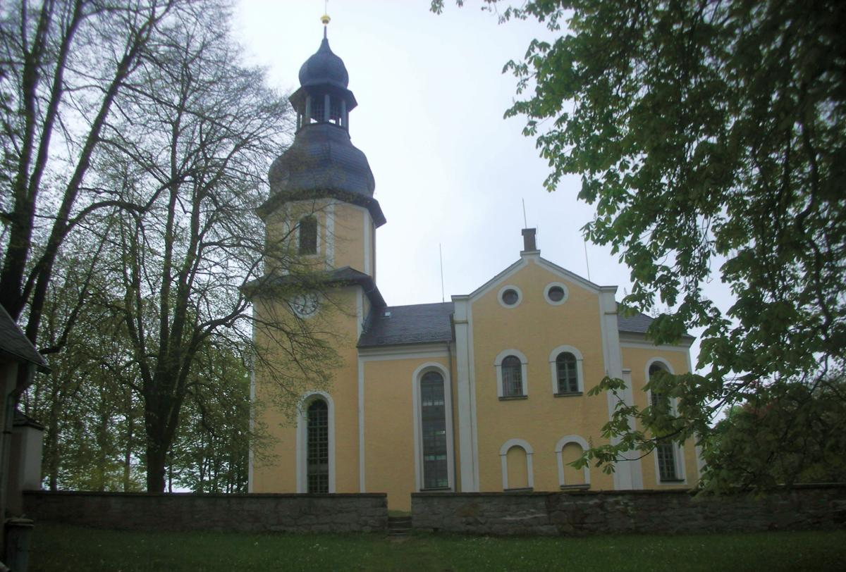 Kirche in Landwüst, Nordseite